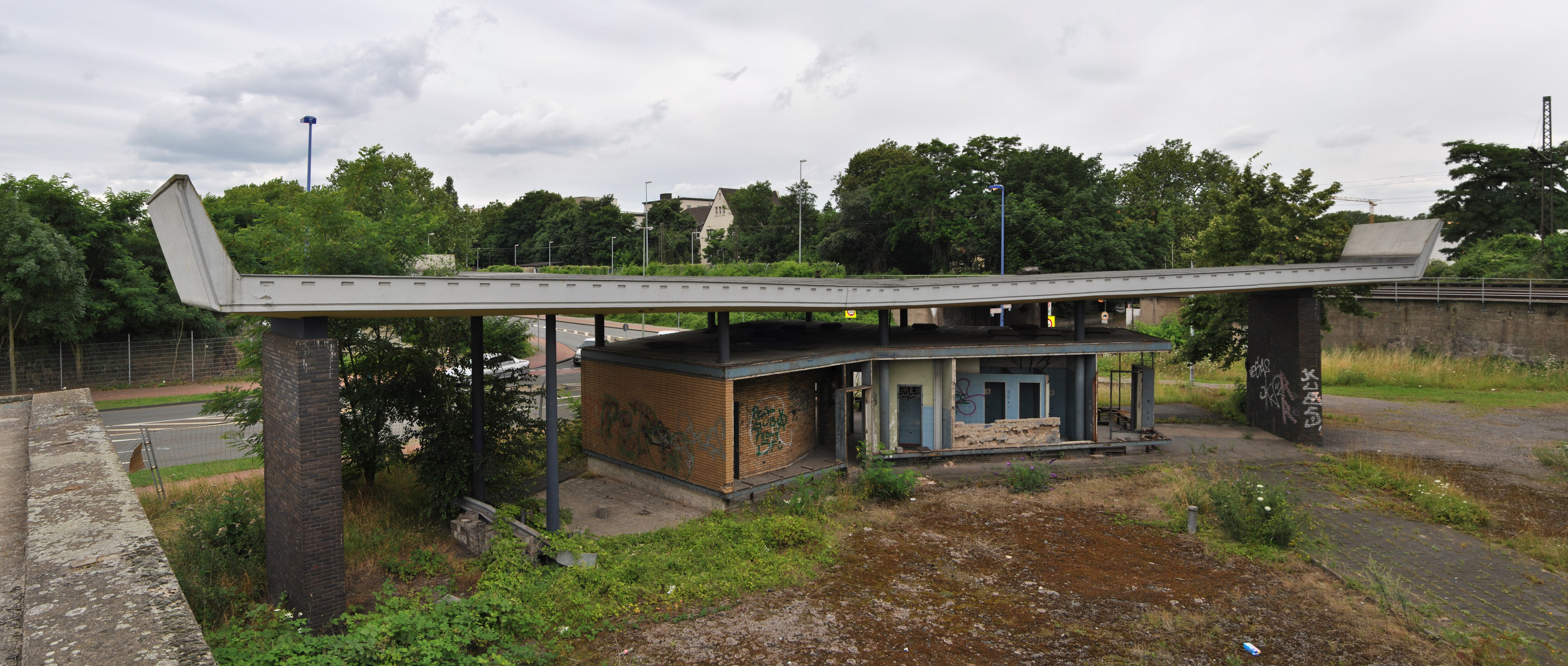 This photograph was taken with a Nikon D3000 This image shows a heritage building in Germany, located in the North Rhine-Westphalian city Duisburg. Panoramaansicht des stark verwahrlosten Werktor 1 (denkmalgeschützt), einzig erhaltenes Zeugnis des früheren bedeutenden Hüttenwerks Rheinhausen, in Duisburg-Friemersheim (2013 wurde das baufällige Pförtnerhäuschen unter dem Werkstor abgerissen und Letzteres von Logport instand gesetzt)